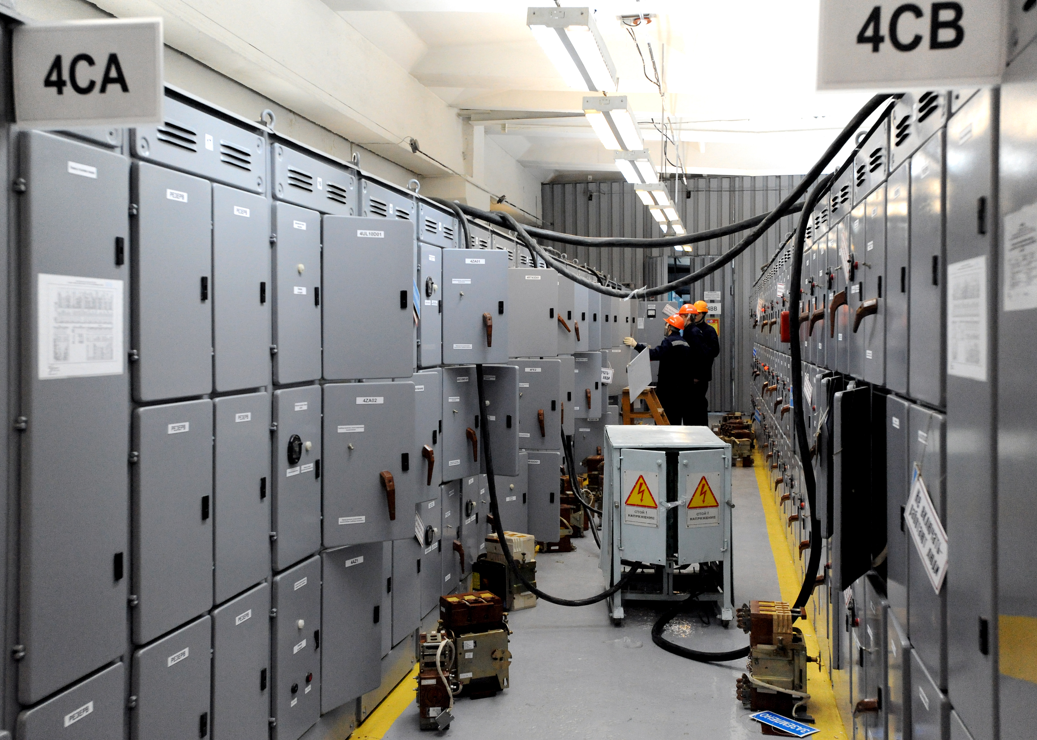 Electric staff